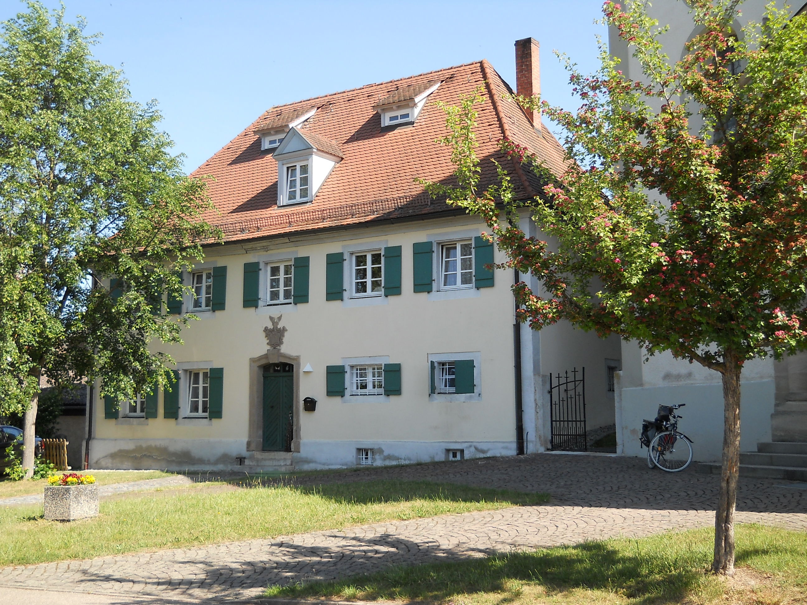 St. Veit, Ortsteil von Pleinfeld im Landkreis Weißenburg-Gunzenhausen (Bayern), Pfarrhaus neben der Kath. Pfarrkirche St. Vitus